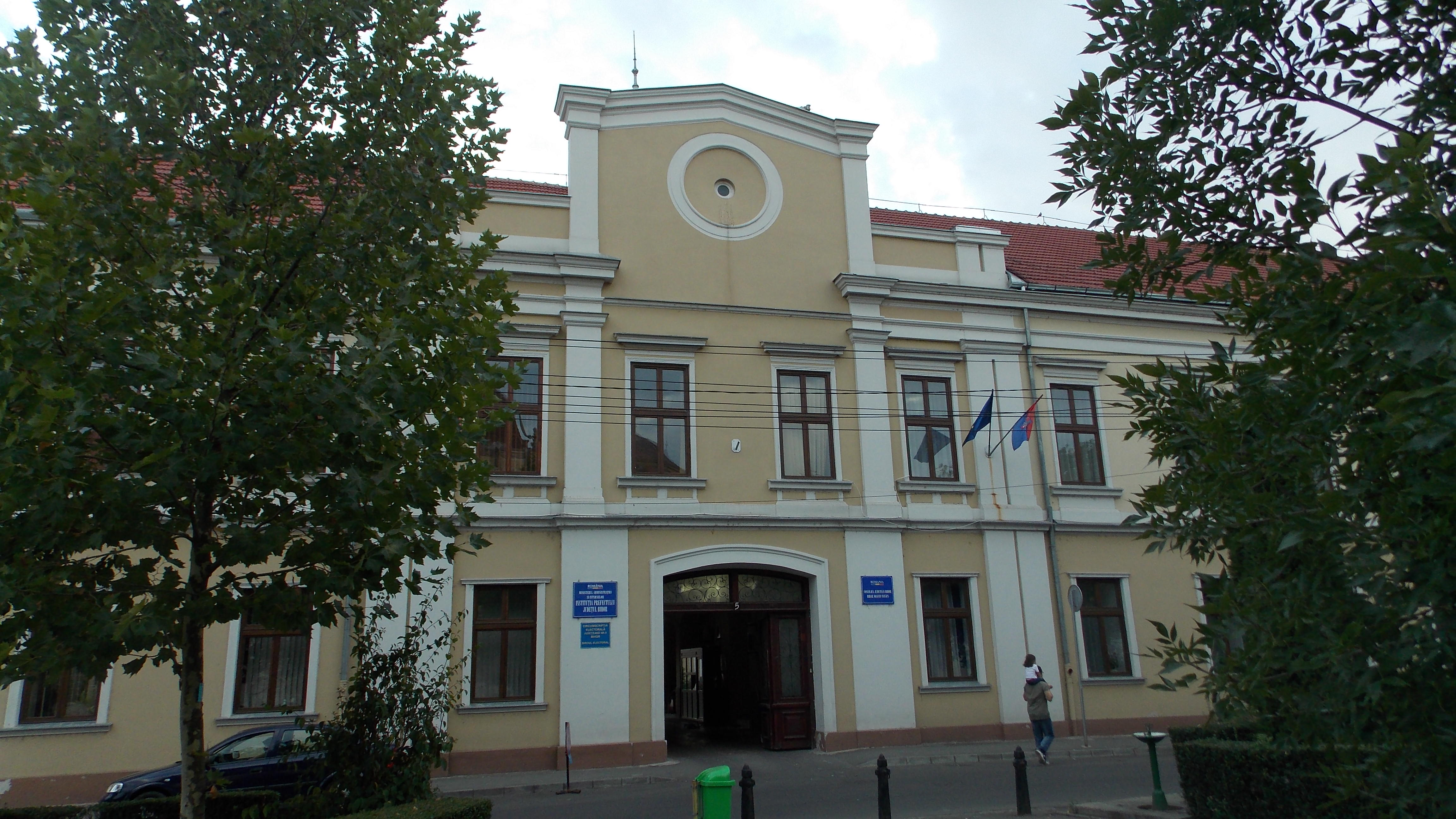 Prefectura județului Bihor, (fosta Casă a Comitatului)